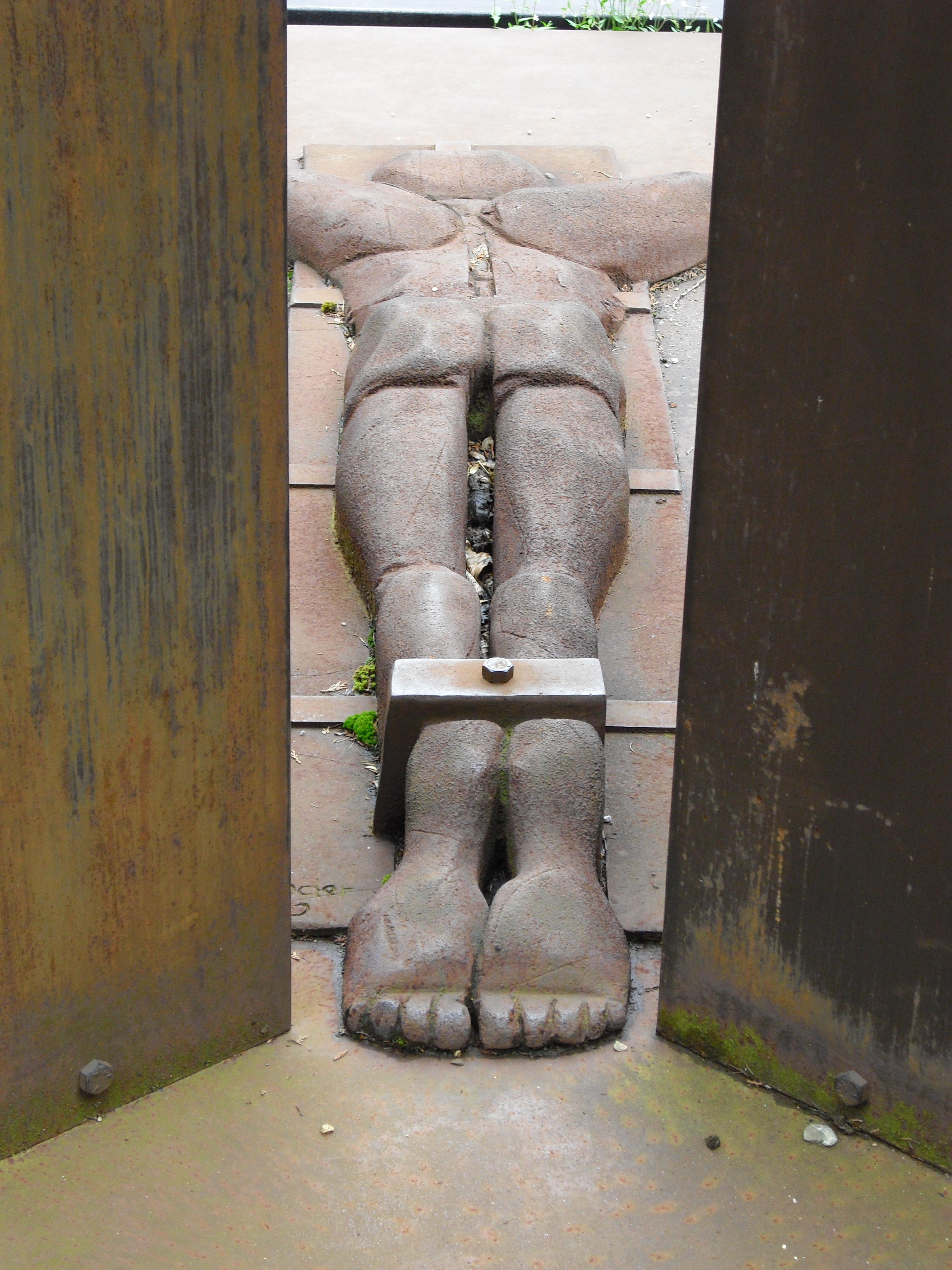 Mahnmal zur Erinnerung an die in der NS-Zeit ermordeten Bewohner der diakonischen Einrichtung Hephata (Schwalmstadt-Treysa)